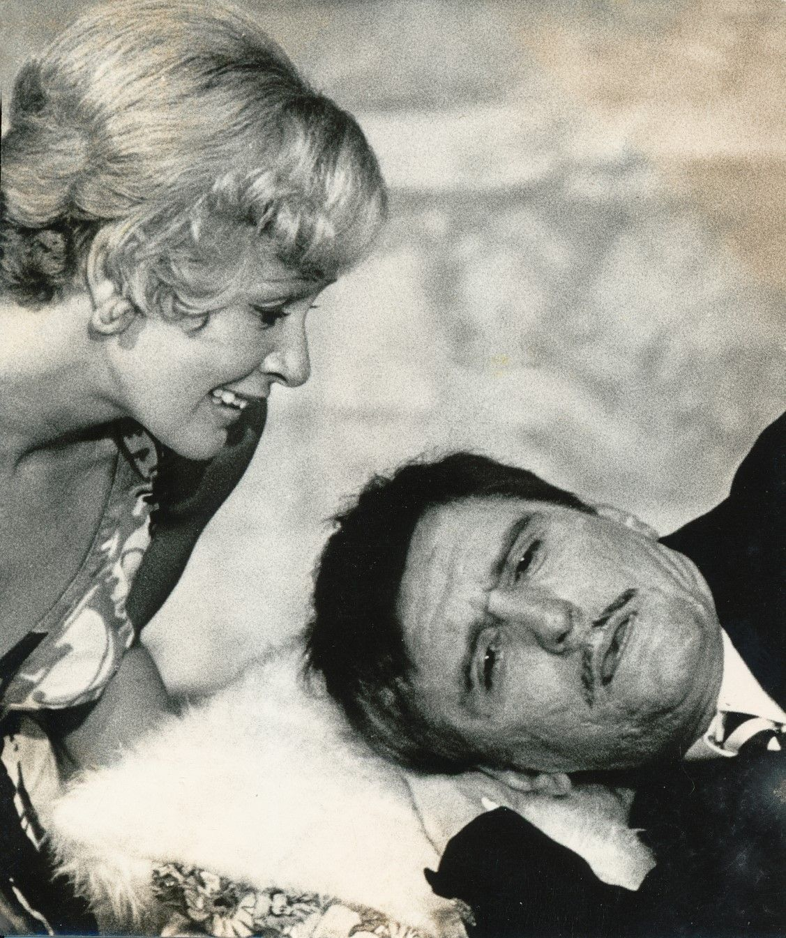 Felkai Eszter és Széplaky Endre a békéscsabai Jókai Színház egyik előadásán